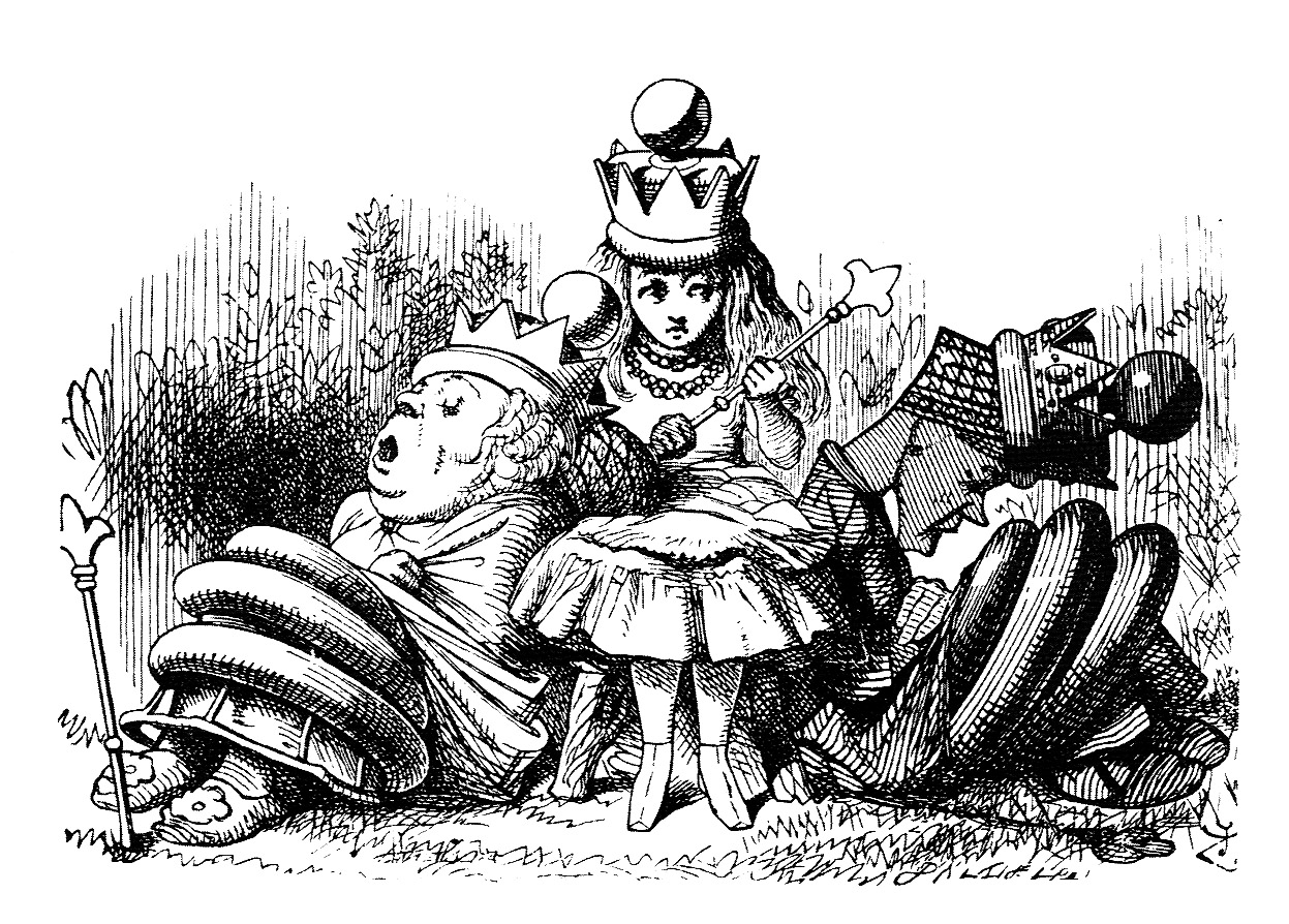 гравюра Джона Тенниела